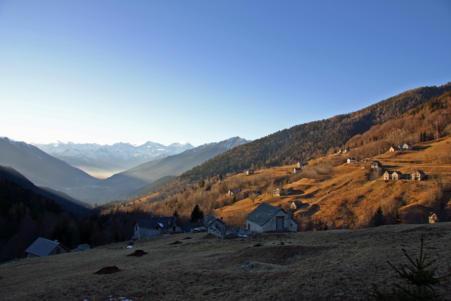 La Val Vigezzo vista dall'Alpe Blitz in una giornata di inizio inverno